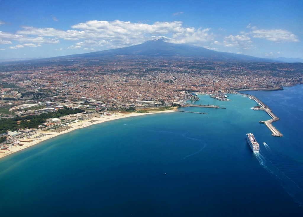 Sicilia - Catania dall'alto